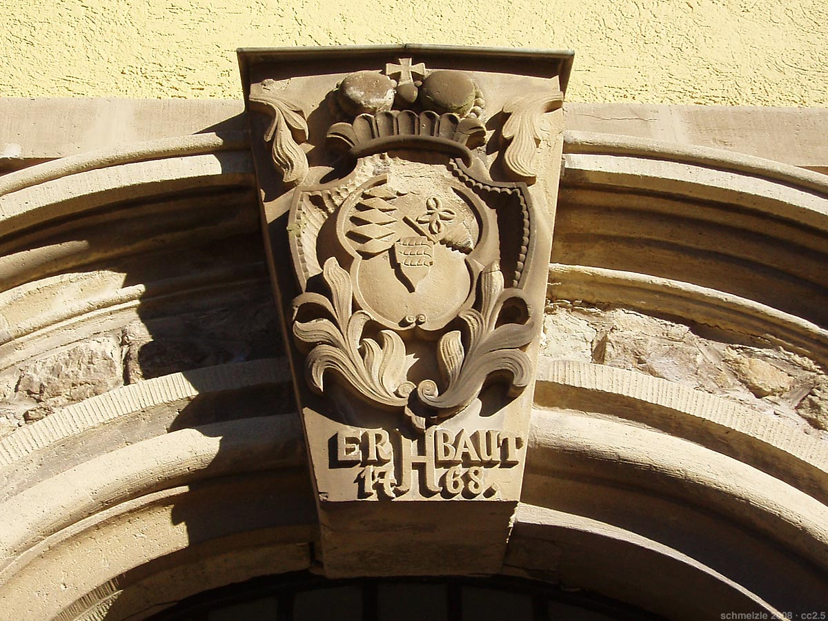 Wappenstein mit Datierung am alten Rathaus in Heilbronn-Horkheim